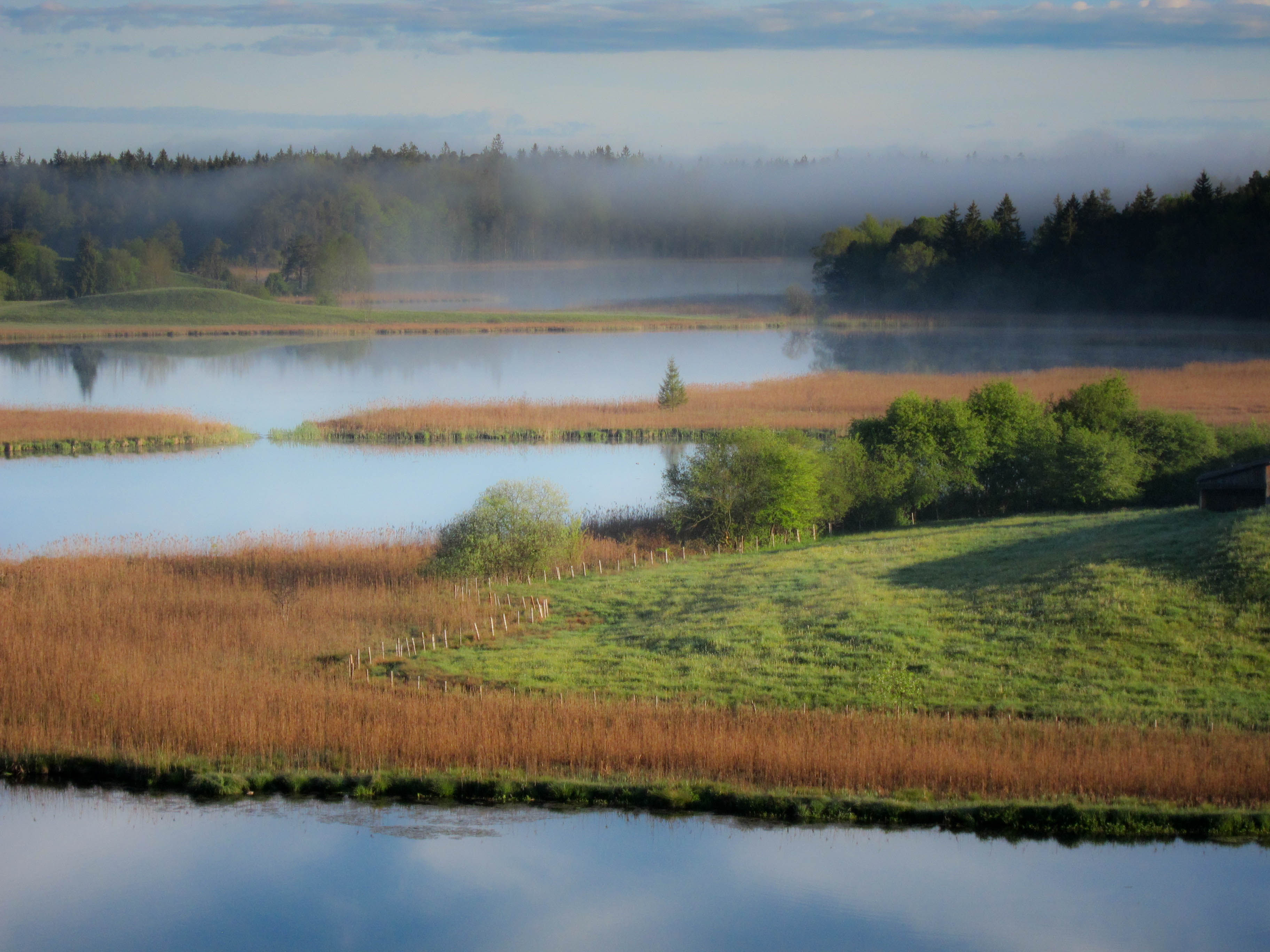 Naturschutzgebiet Osterseen, Waschsee, Schiffhüttensee, Sengsee, Morgennebel, Frühjahr